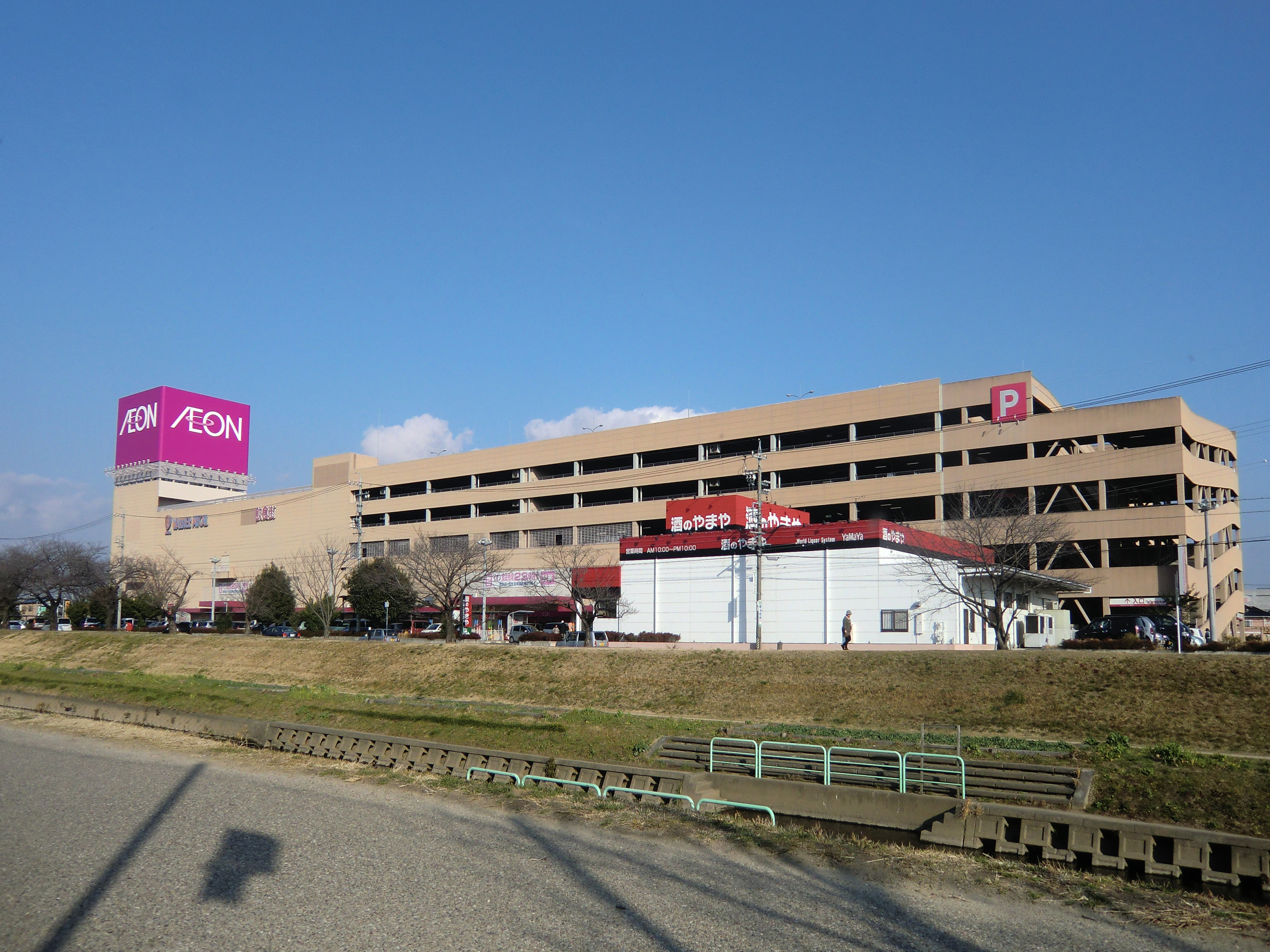 屋外広告物を付け替えた直後の豊川サティ。2011年3月から、イオン豊川としての営業を開始した